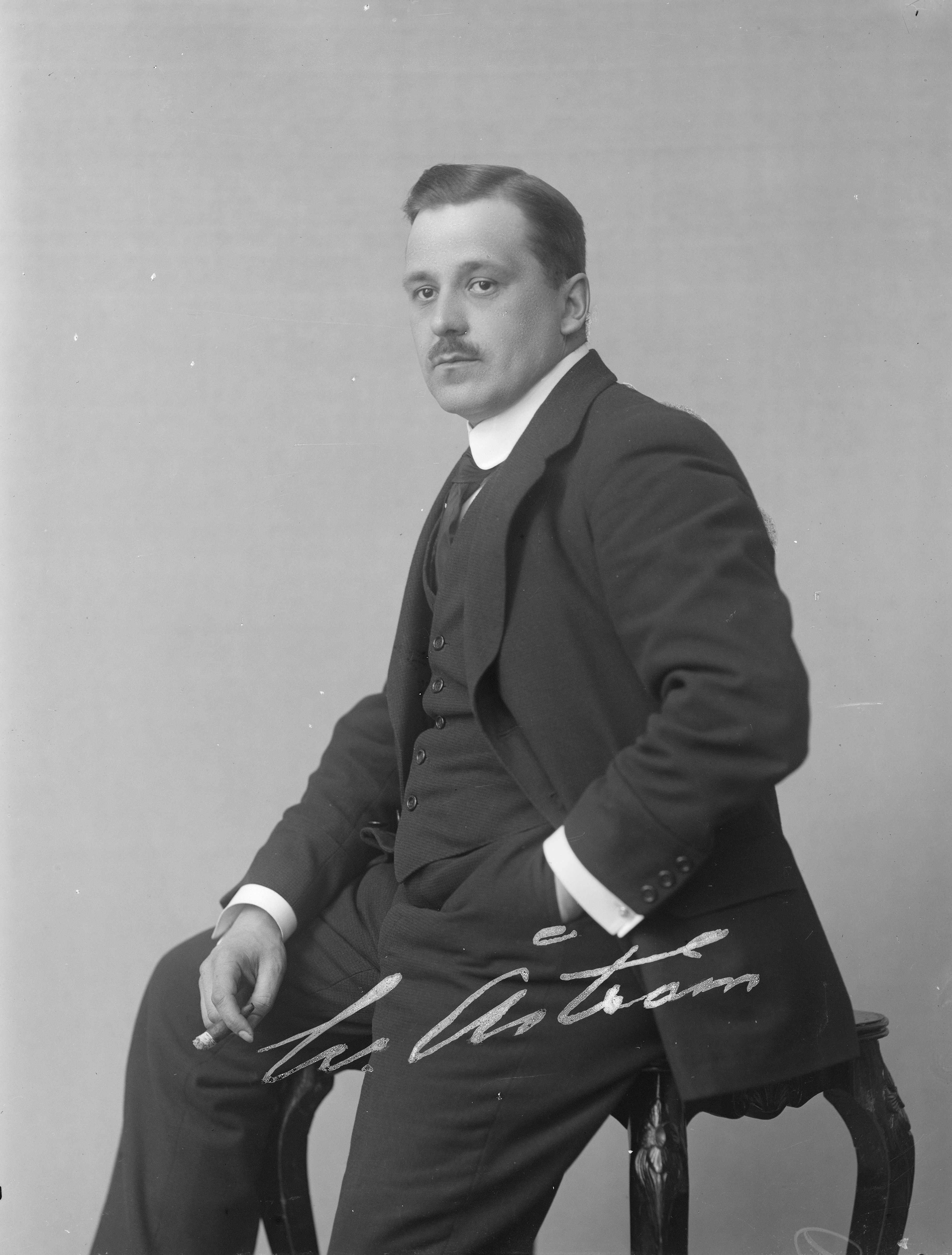 Taiteilija Werner Åström